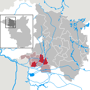 Neustadt (Dosse) in Brandenburg (Country) - District Ostprignitz-Ruppin